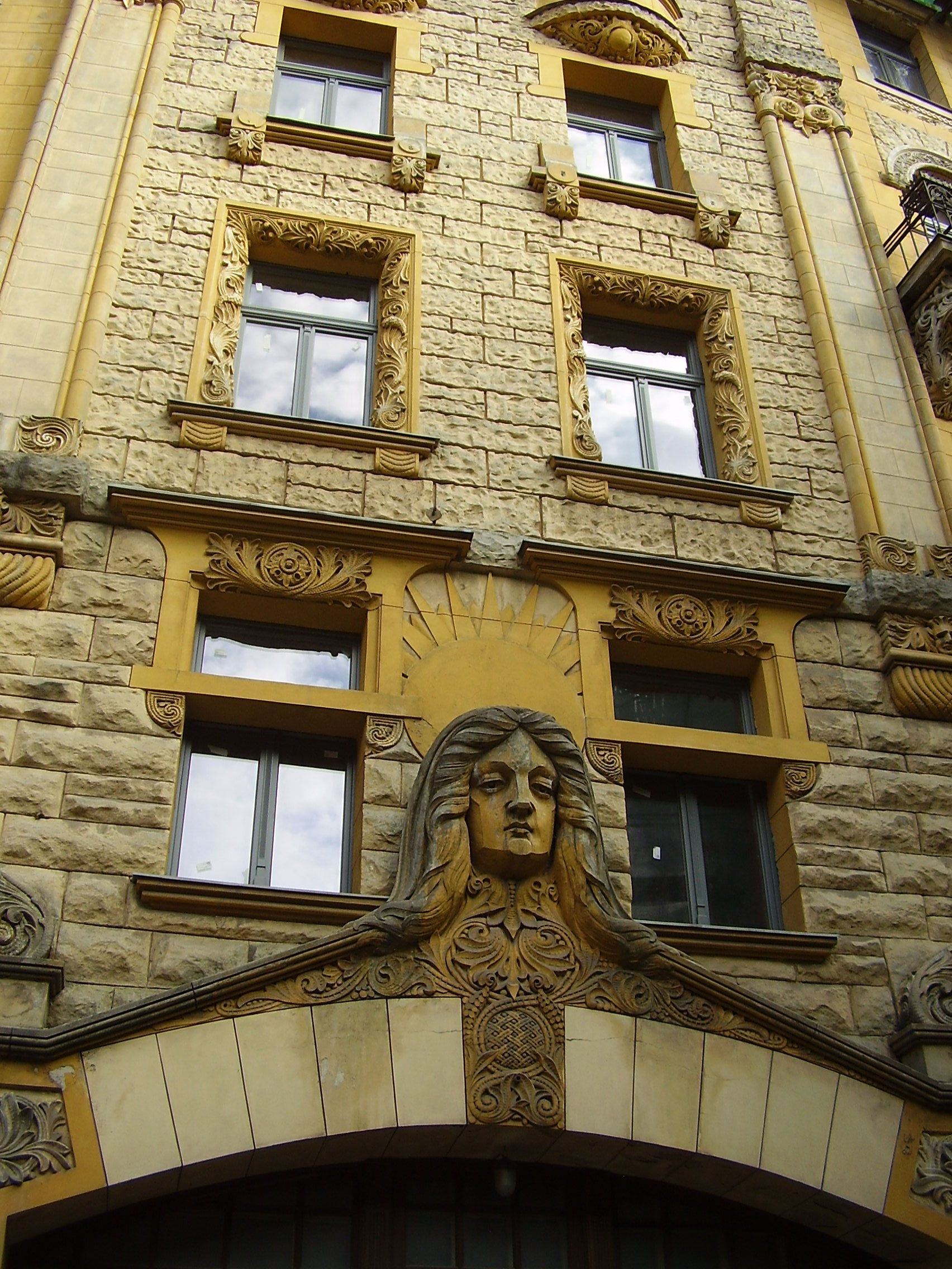 Будинок-кіногерой